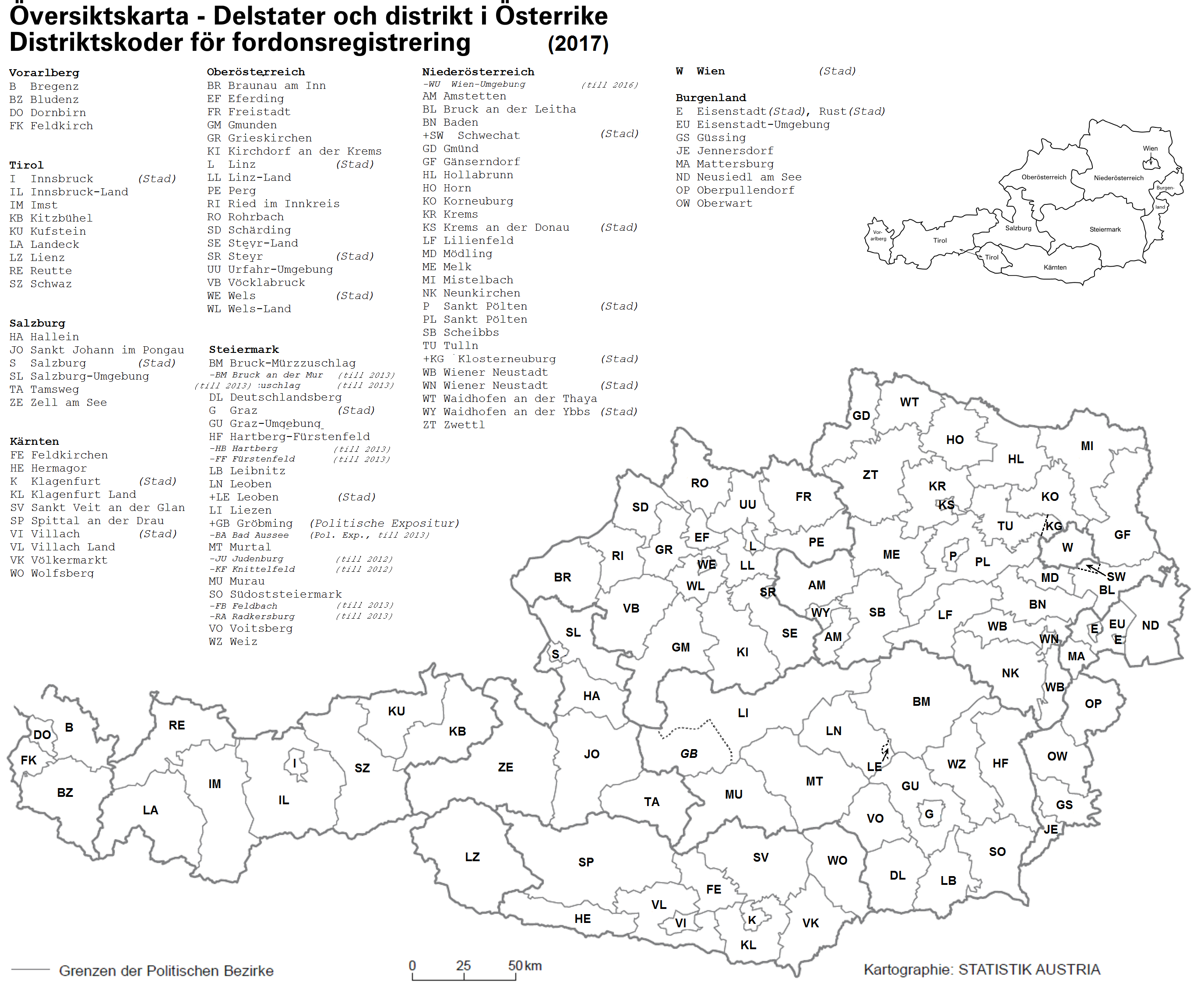 Delstater och distrikt i Österrike Delstatskoder för fordonsregistrering